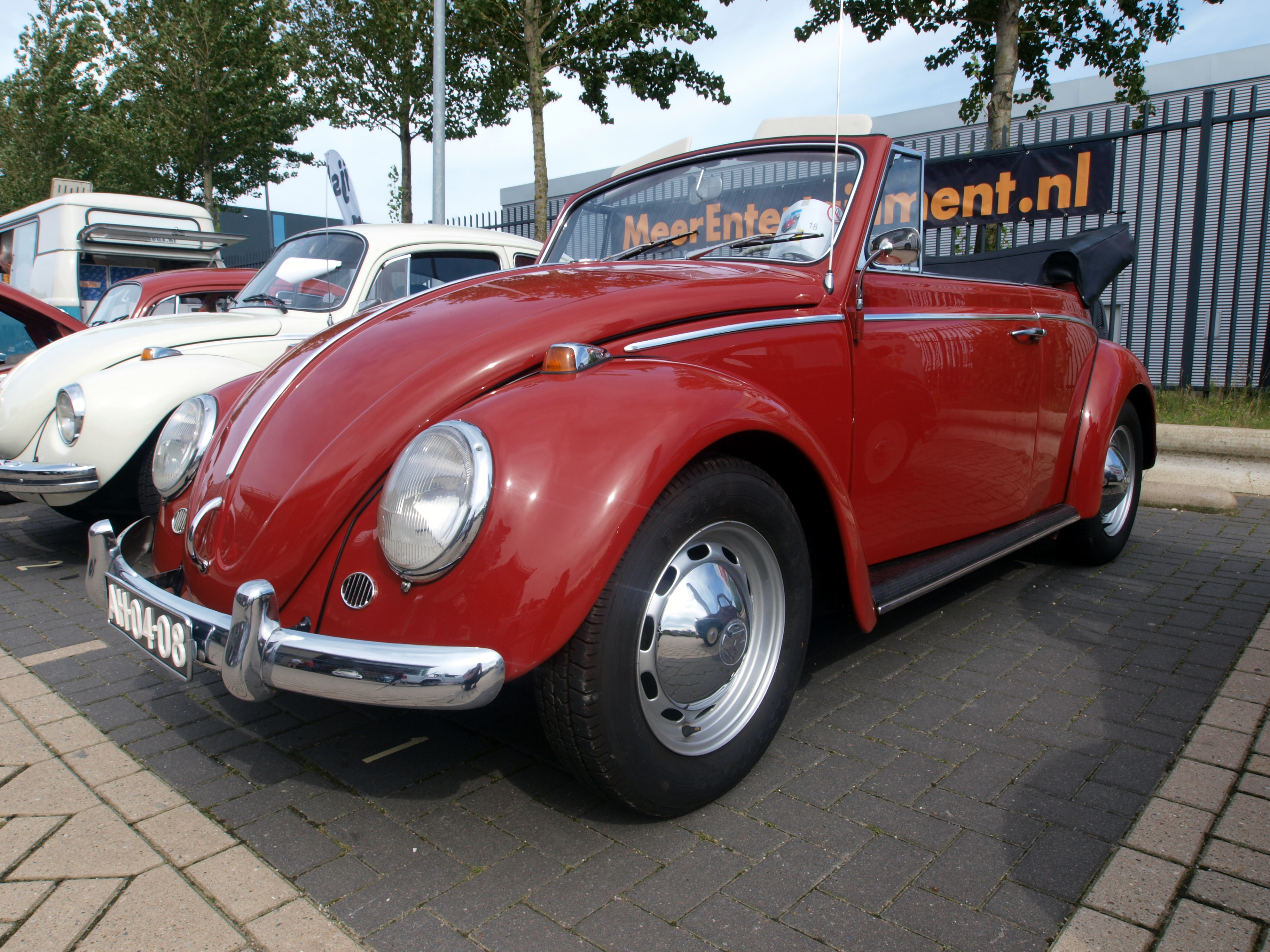 1965 Volkswagen 1200 Beetle